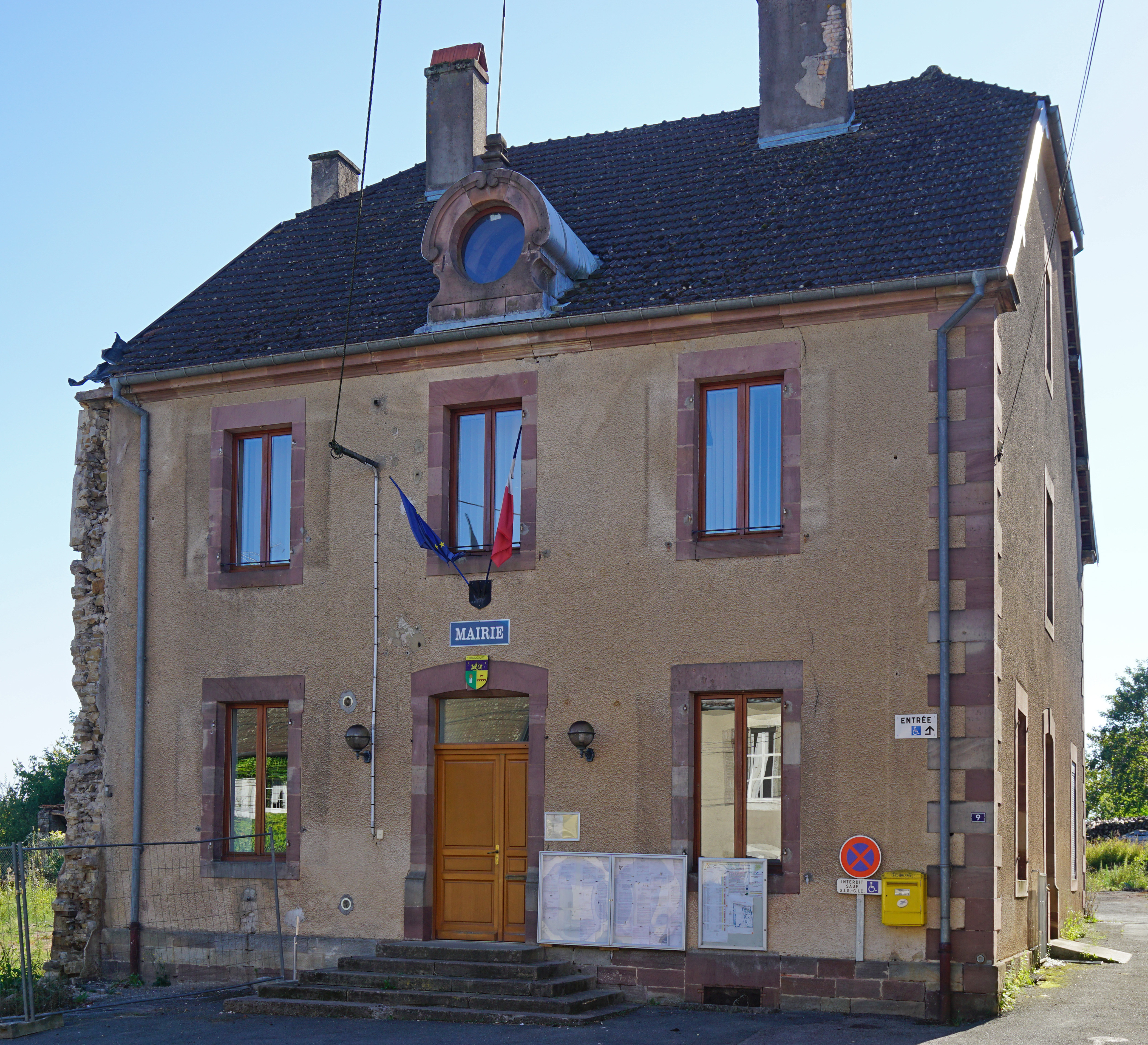 Mairie de Briaucourt en Haute-Saône.